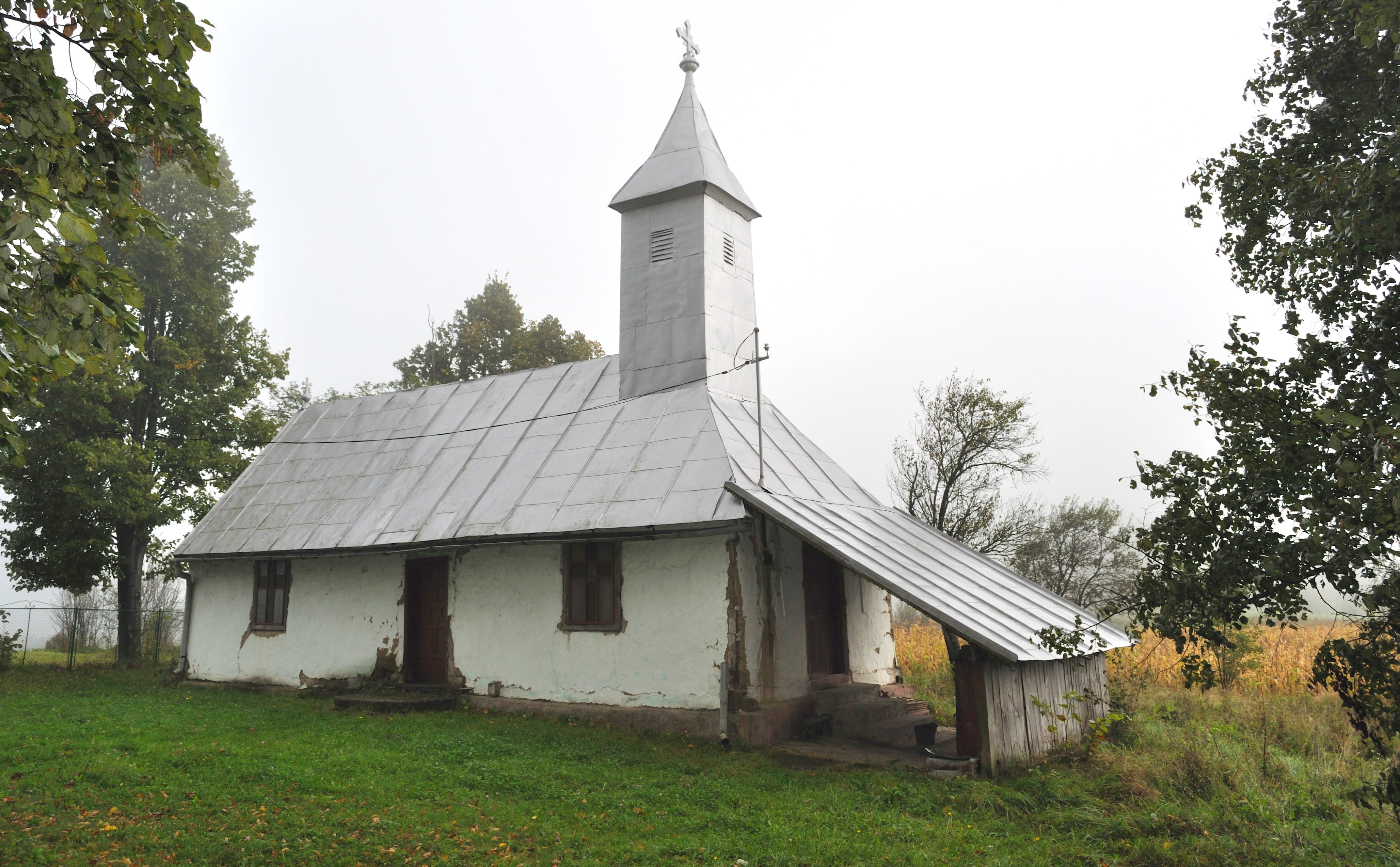 Biserica de lemn „Sfinții Apostoli Petru și Pavel” din Coșevița, județul Timiș